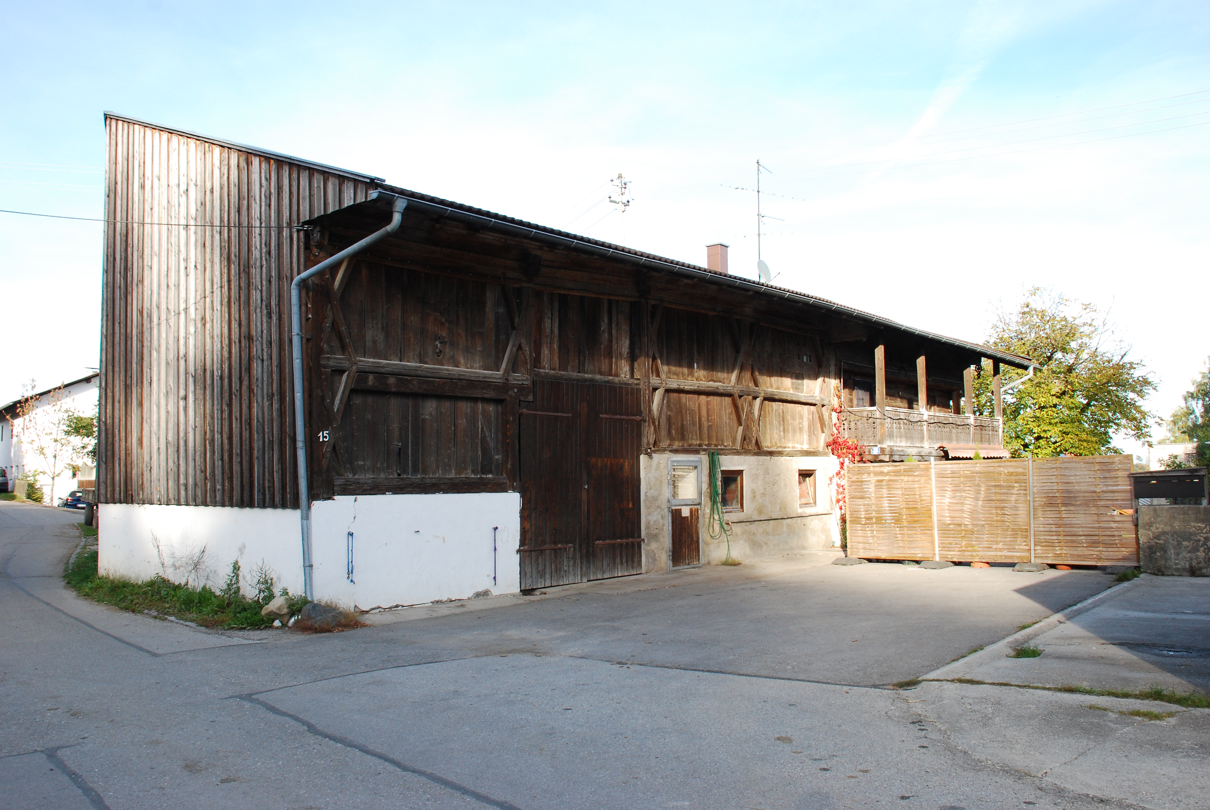 Bauernhof "Beim Buschin" in Graß, Ortsteil von Aying, Landkreis München, Regierungsbezirk Oberbayern, Bayern. Als Baudenkmal unter Aktennummer D-1-84-137-31 in der Bayerischen Denkmalliste aufgeführt. Bild gemäß den Vorgaben zur Panoramafreiheit von öffentlichem Verkehrsgrund aus aufgenommen.